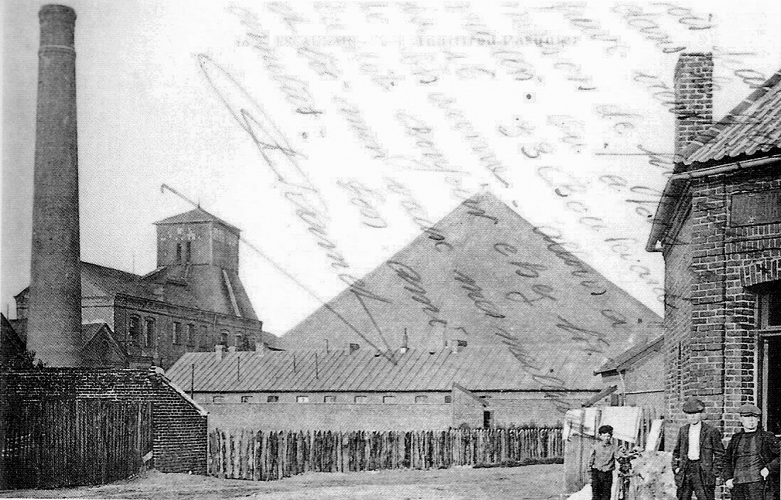 Fosse Audiffret de la Cie des mines d'Anzin fermée en 1967